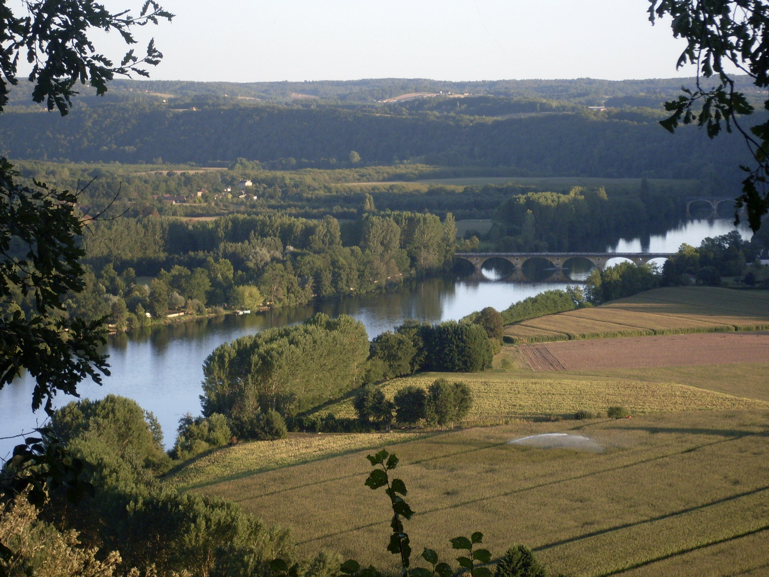 Au-dessus du cingle de Tremolat, France